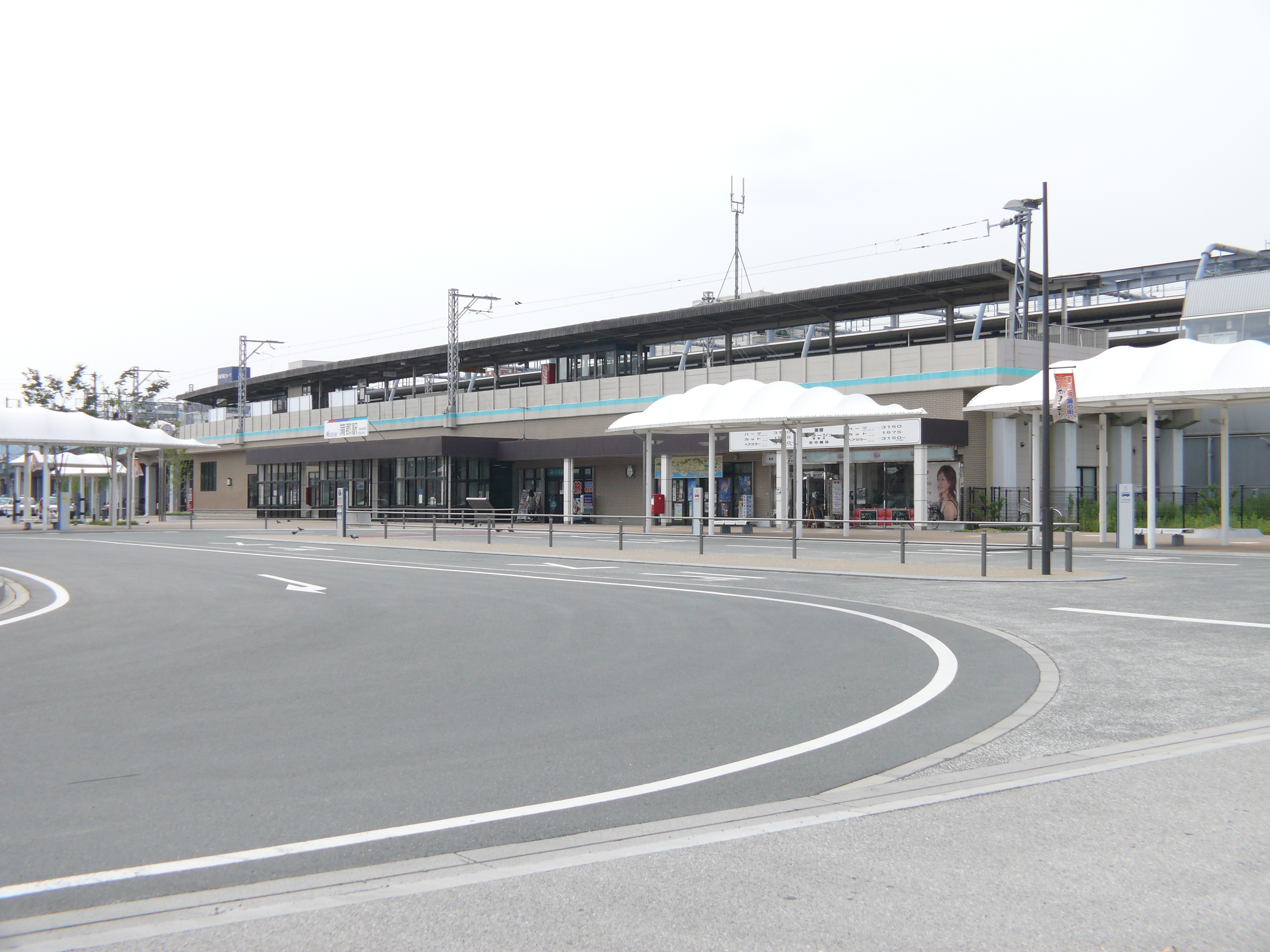 愛知県蒲郡市にある名古屋鉄道の蒲郡駅。